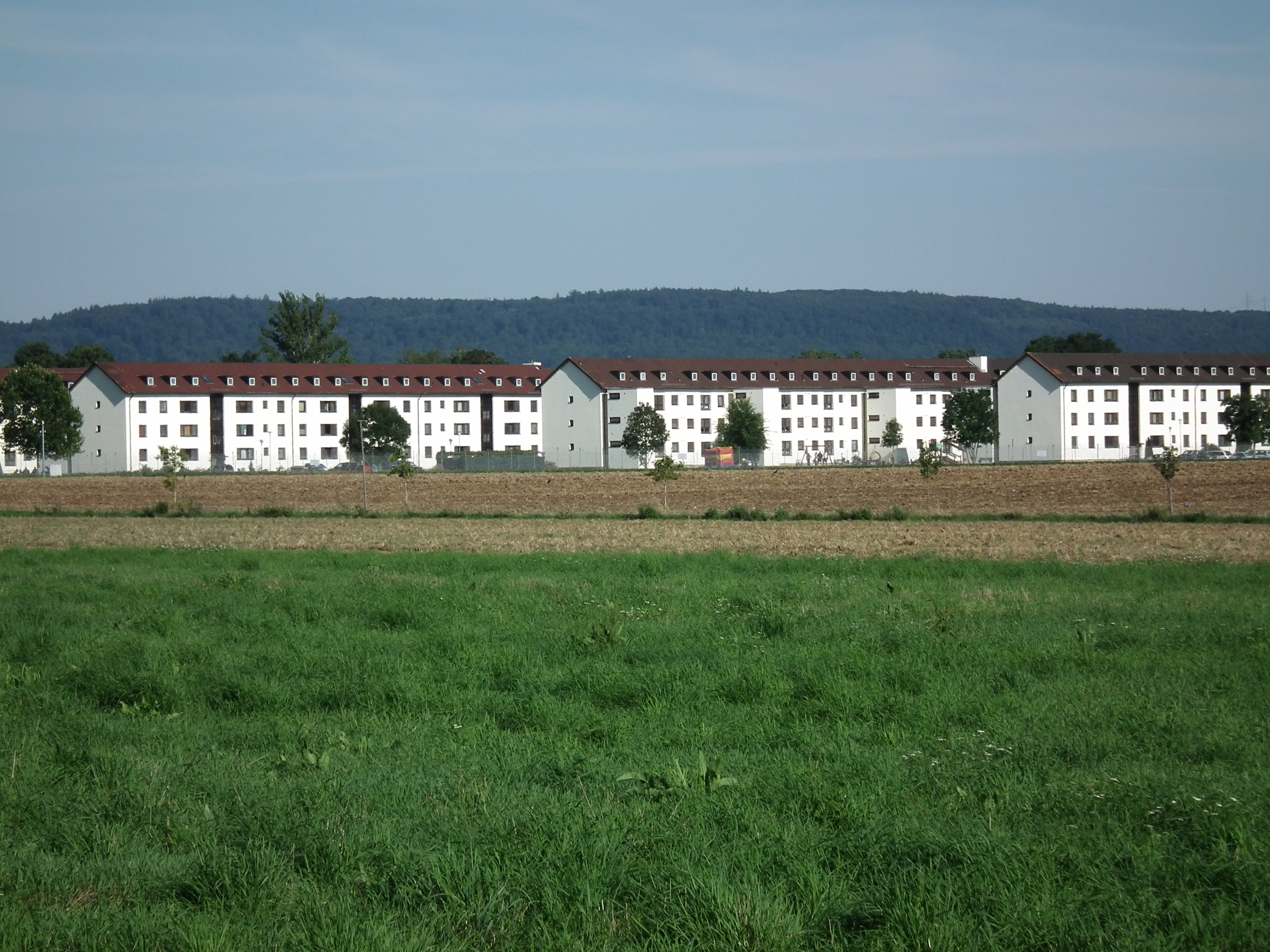 Blick von Norden auf Wohnhäuser der Patrick-Henry-Village, einem 1947 erbauten US-Stützpunkt auf Heidelberger Gemarkung (Baden-Württemberg, Deutschland)